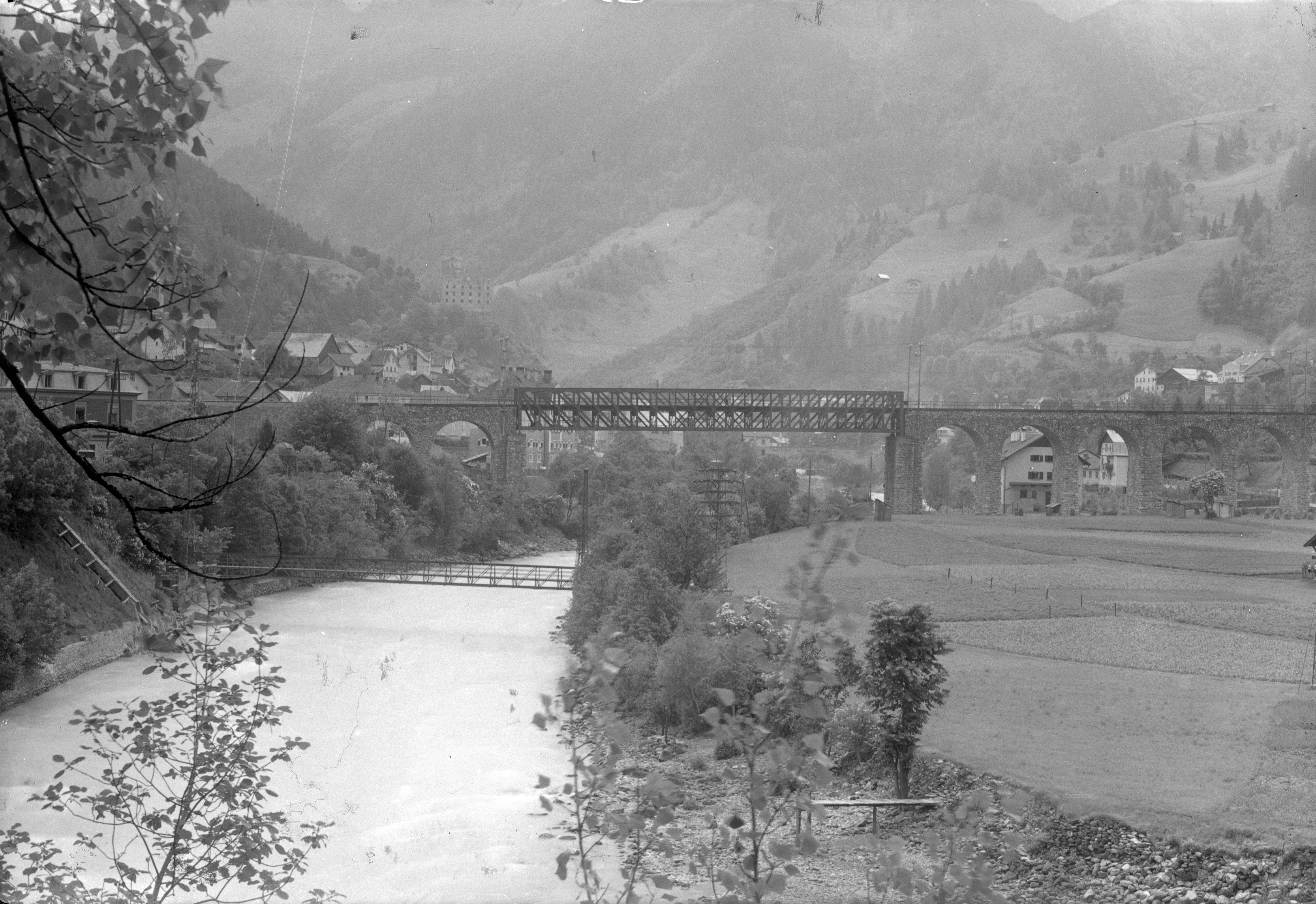 Aufnahme von der Innbrücke zwischen Landeck-Zams und Landeck-Perfuchs im km 73,4 / Josef Wilhelm Purtscher